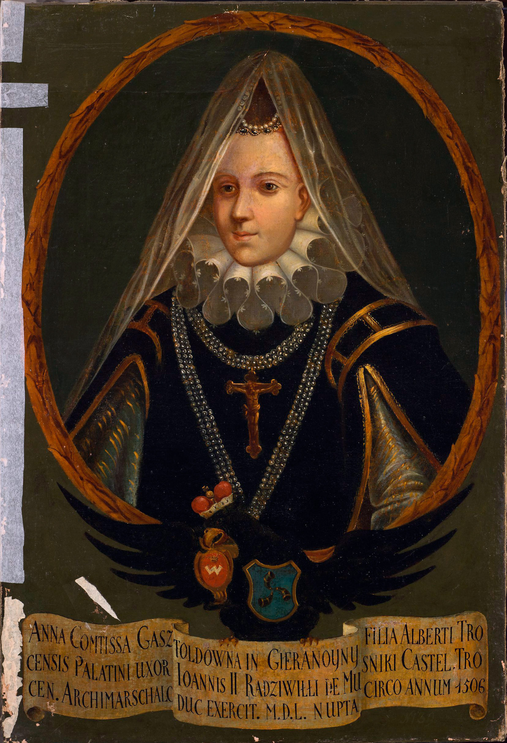 Беларуская (тарашкевіца): Партрэт Альжбеты Радзівіл (Alžbieta Radzivił) з роду Гаштольдаў (Gaštold)